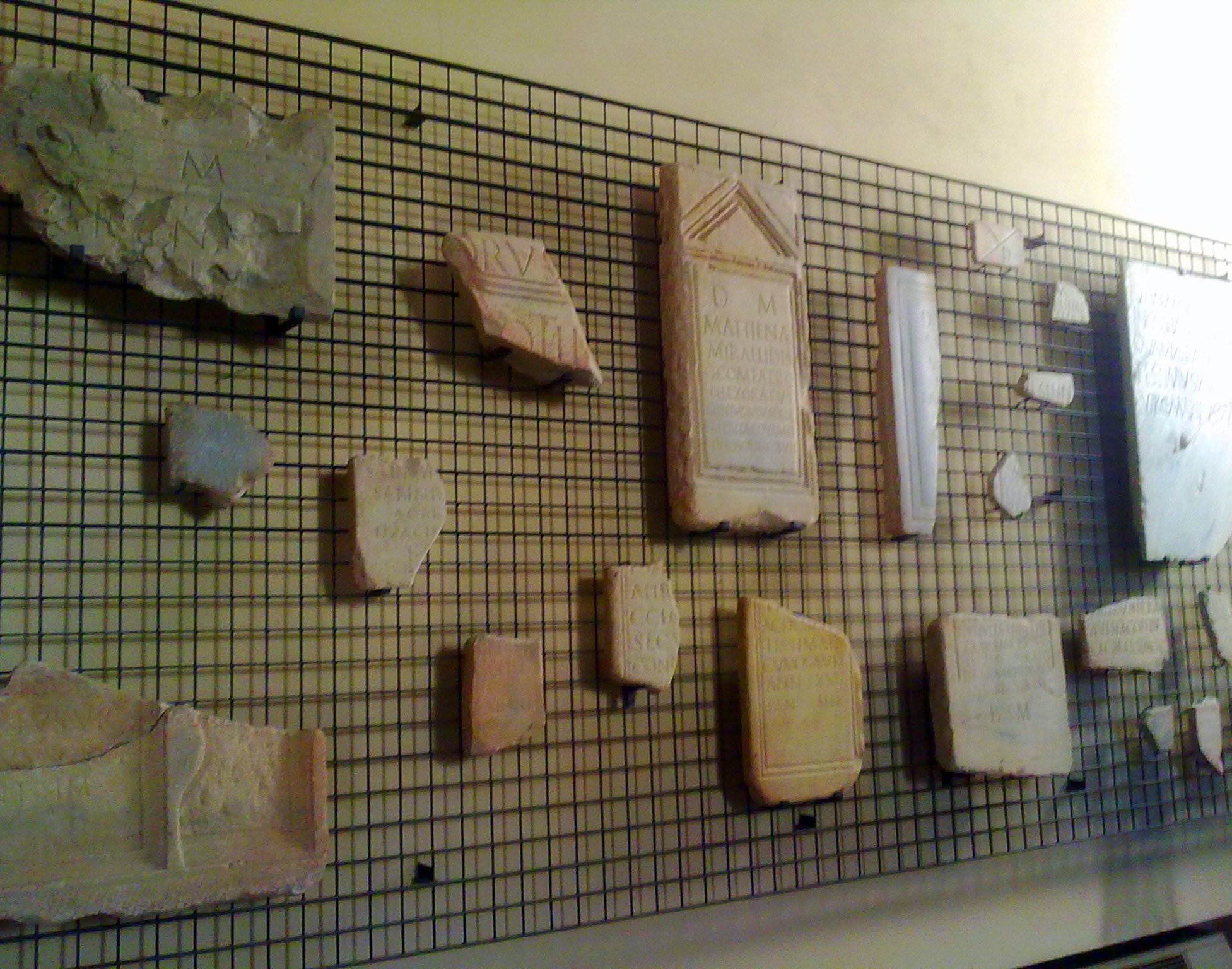 Iscrizioni romane, Museo Archeologico Nazionale di Sarsina